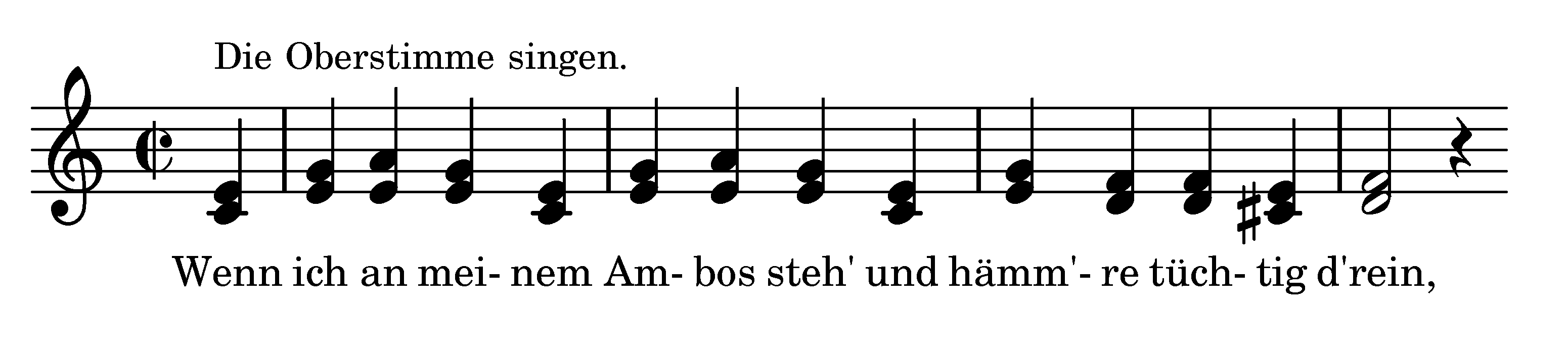 Der kreuzfidele Kupferschmied, Opus 70 Trio, Gesang/Strophen